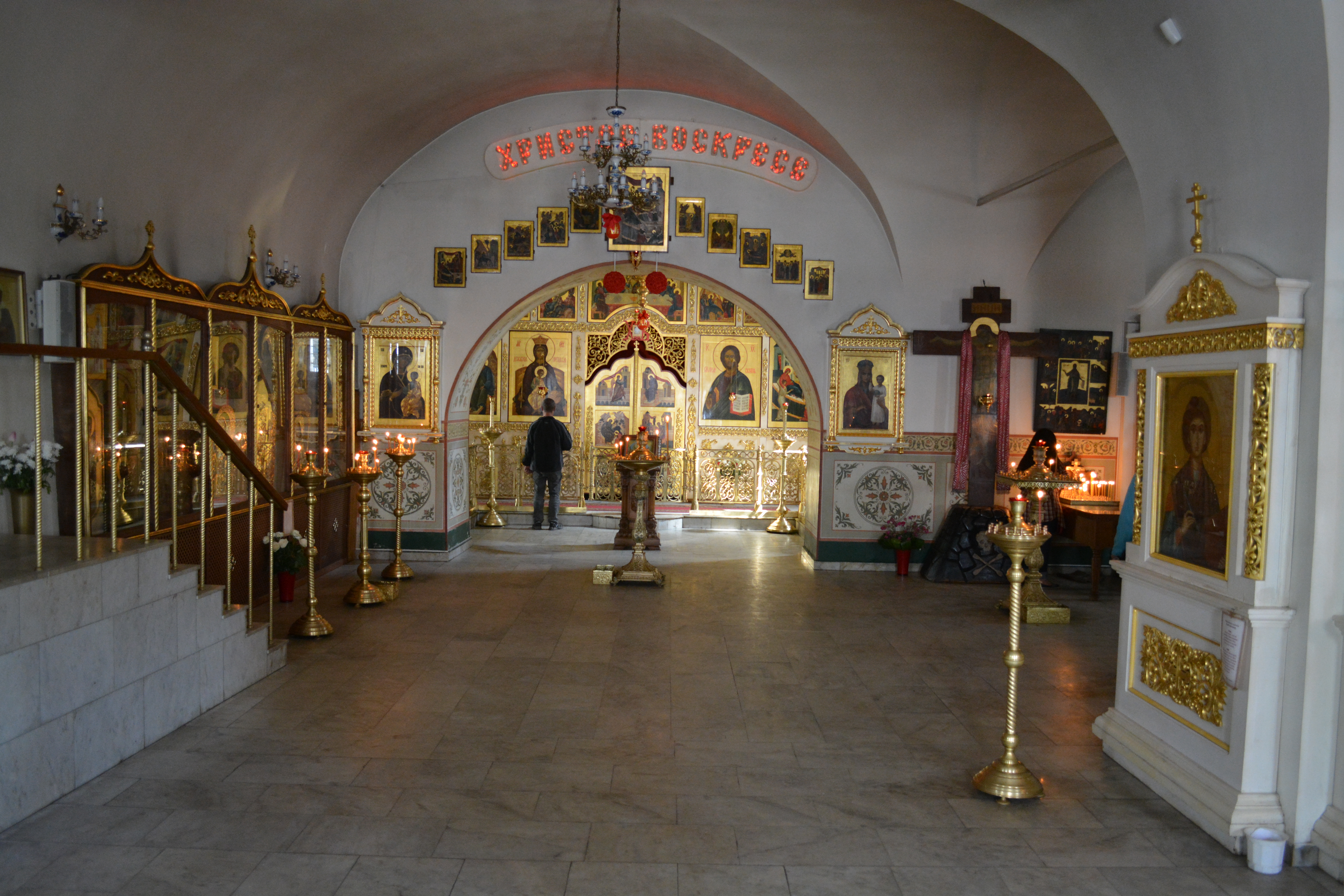 La iglesia de la Natividad de la Vírgen en Putinki (en ruso: Церковь Рождества Богородицы в Путинках) es una iglesia del siglo XVII de Moscú.